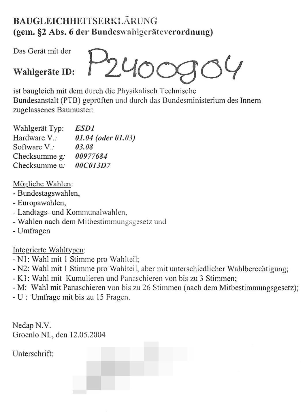 Baugleichheitserklärung gem. § 2 Abs. 6 der Bundeswahlgeräteverordnung für das Wahlgerät Nedap ESD1. Zugelassen für Bundestagswahlen, Europawahlen, Landtags- und Kommunalwahlen, Wahlen nach dem Mitbestimmungsgesetzt und Umfragen